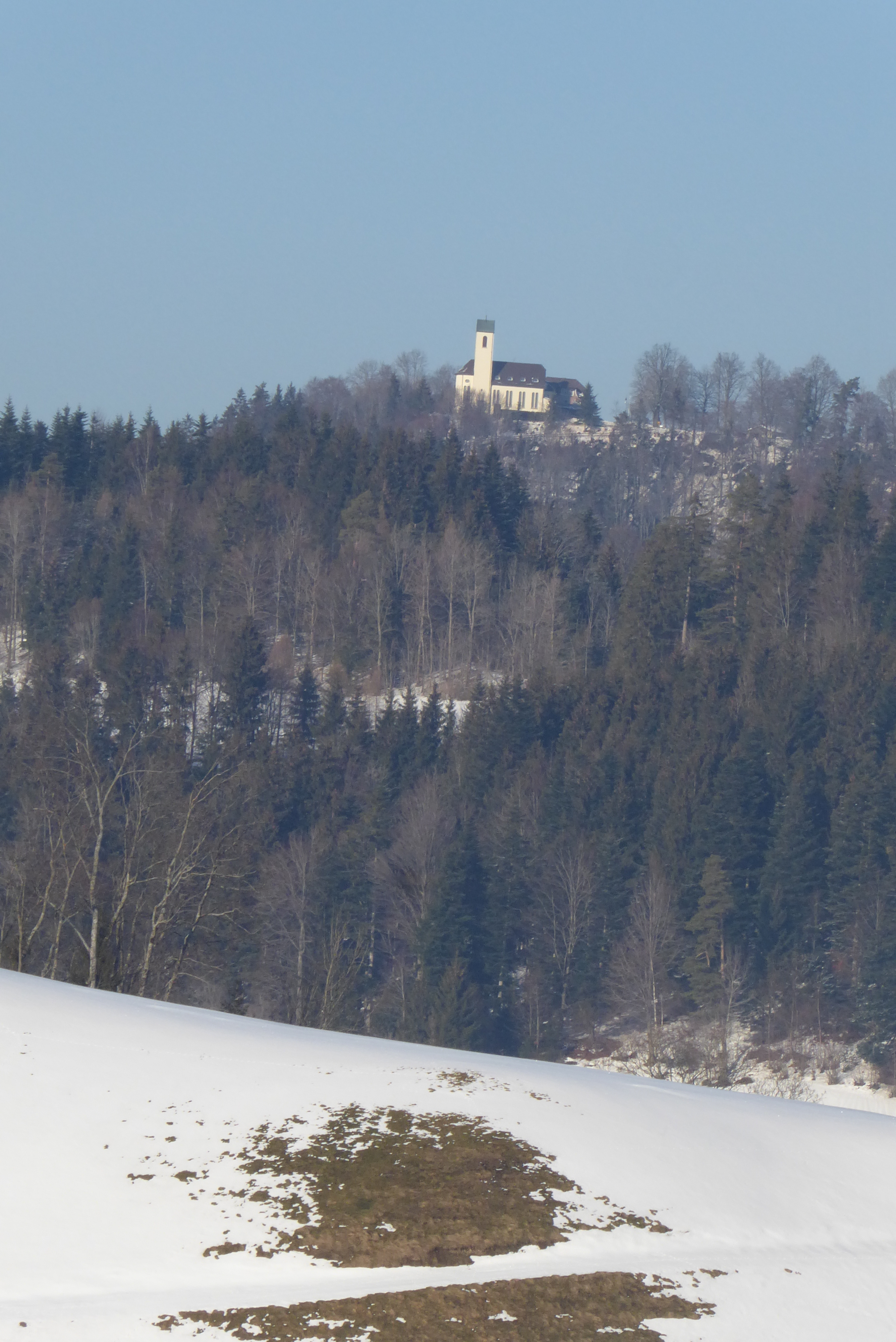 Blick auf St. Iddaburg von Berlig, Mühlrüti